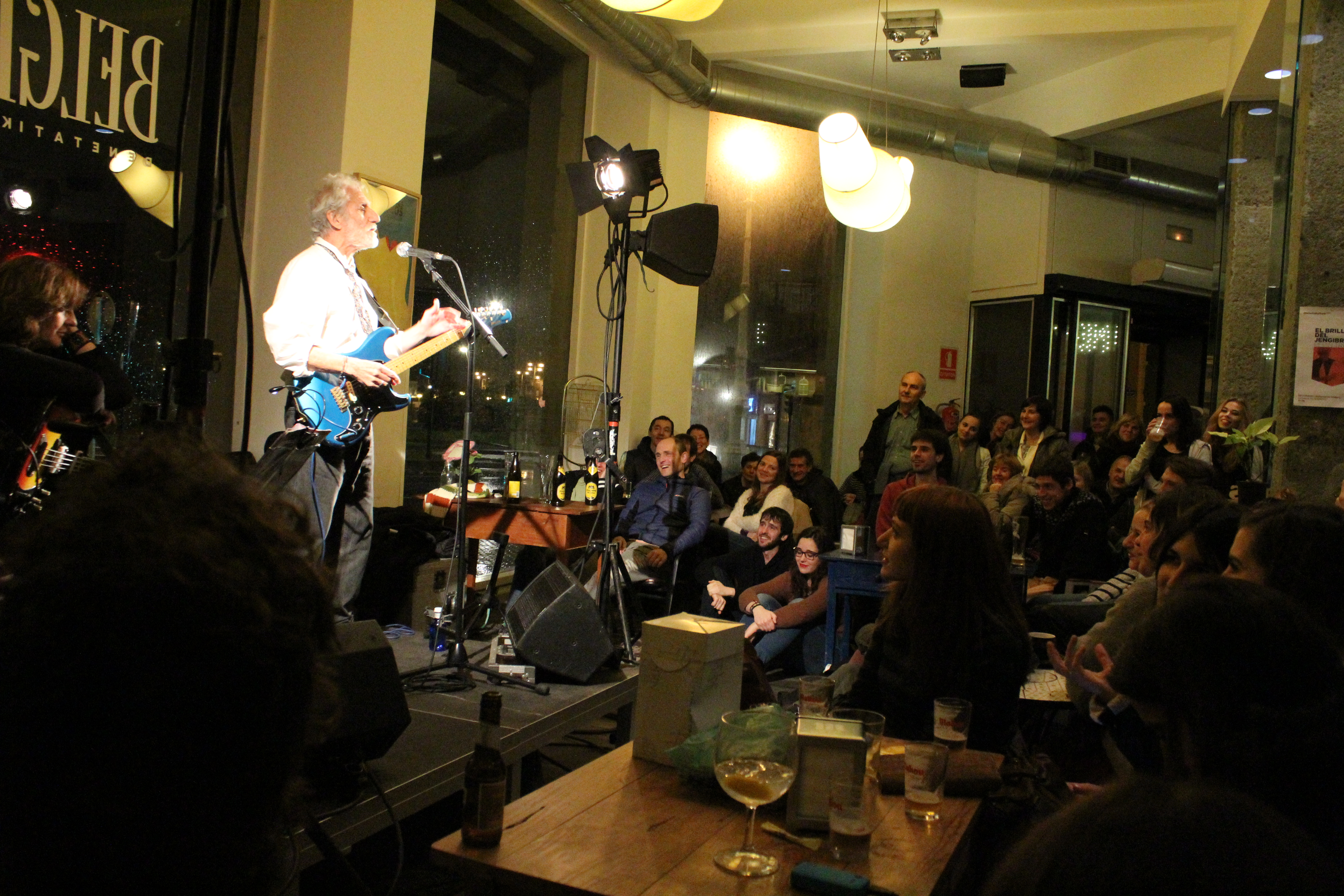 Pepín Tre en Belgrado (Gros).